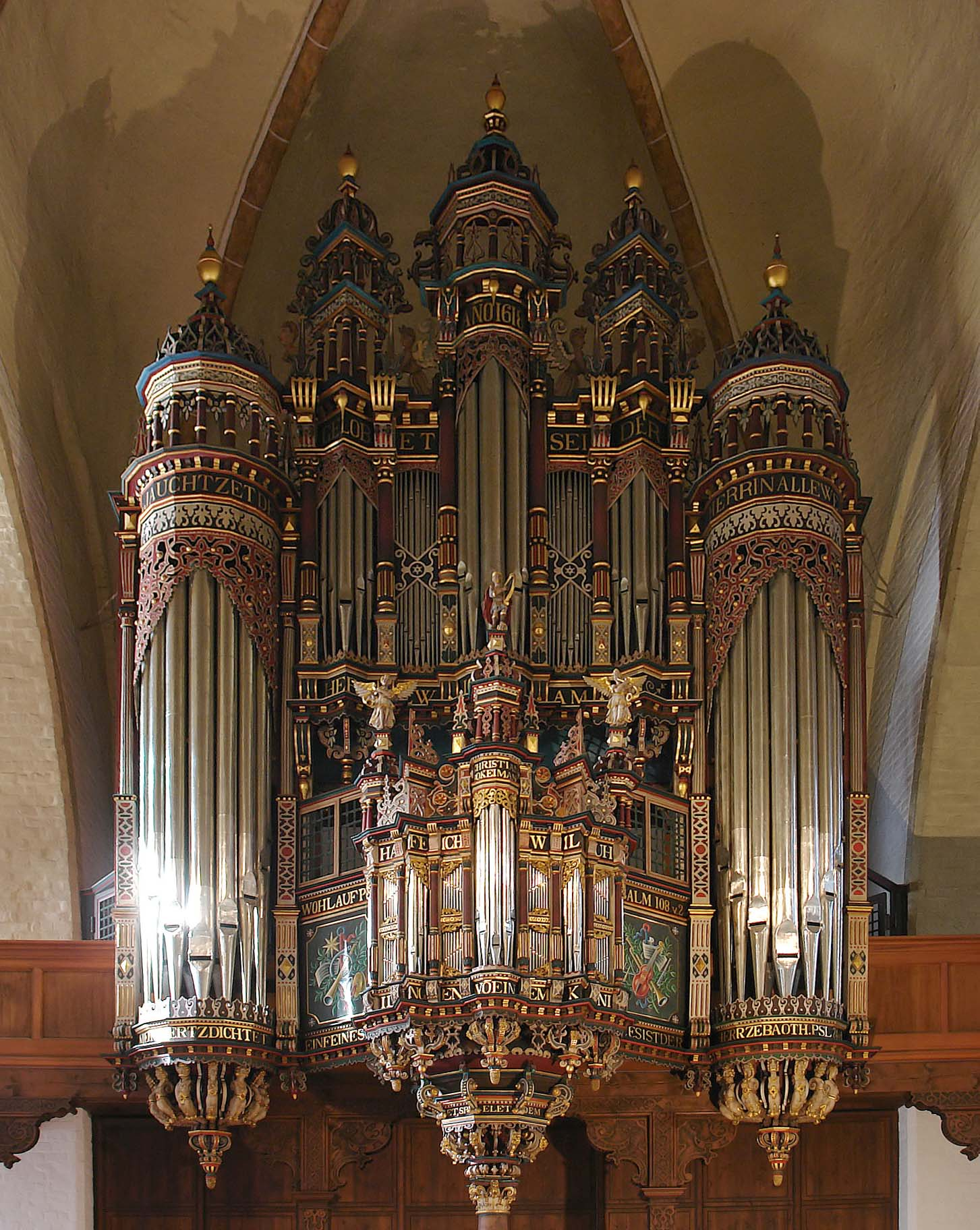 St.Martini-Kirche in Bremen. Orgelprospekt von 1619